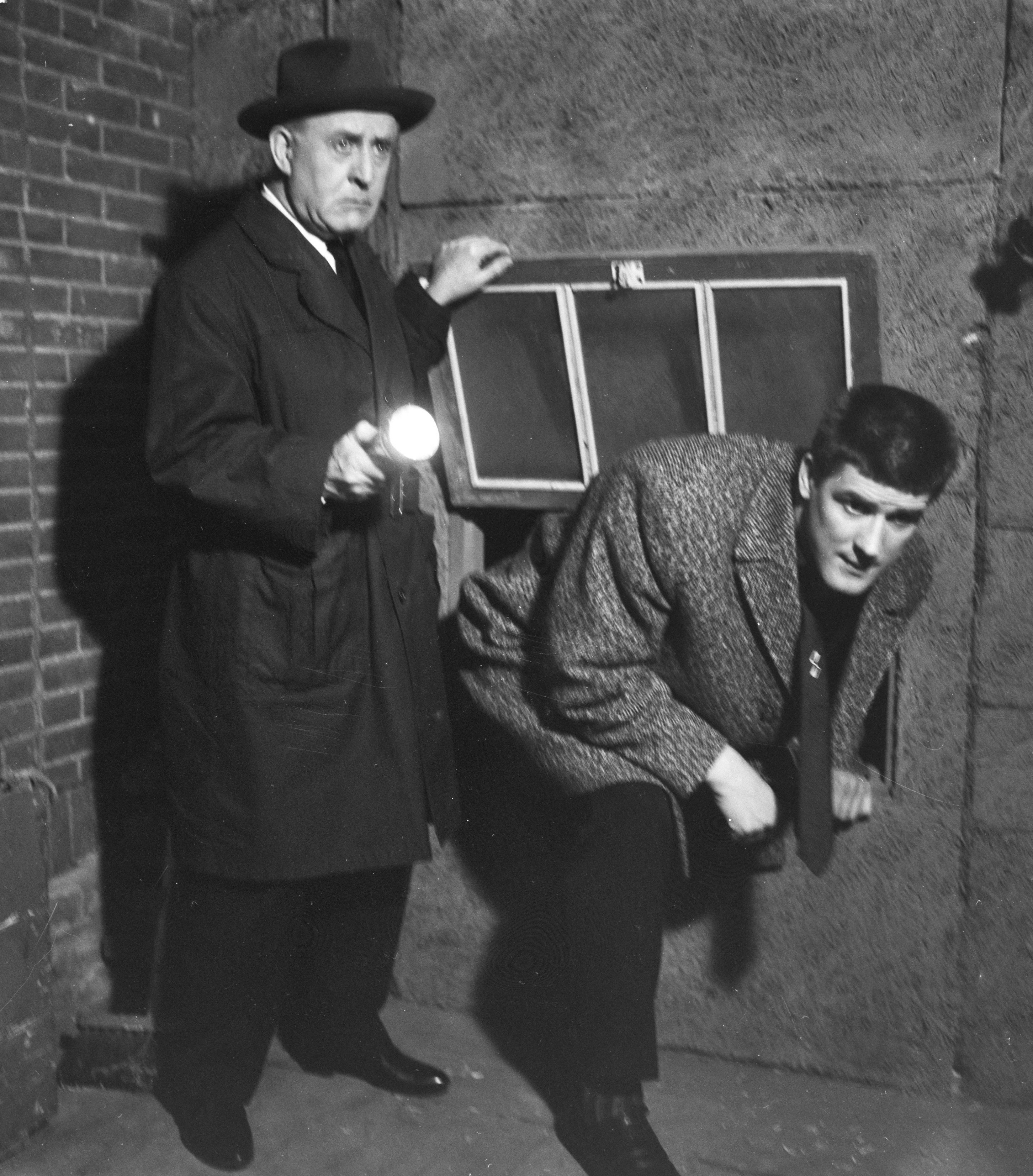 Collectie / Archief : Fotocollectie Anefo Reportage / Serie : [ onbekend ] Beschrijving : Film "Rififi in Amsterdam" (regie: Giovanni Korporaal); Anton Geesink (als rechercheur) en Johan Kaart (commissaris Van Houthem) Datum : 9 april 1962 Trefwoorden : acteurs, films Persoonsnaam : Geesink, Anton, Kaart, Johan Fotograaf : Bilsen, Joop van / Anefo Auteursrechthebbende : Nationaal Archief Materiaalsoort : Negatief (zwart/wit) Nummer archiefinventaris : bekijk toegang 2.24.01.04 Bestanddeelnummer : 913-7461